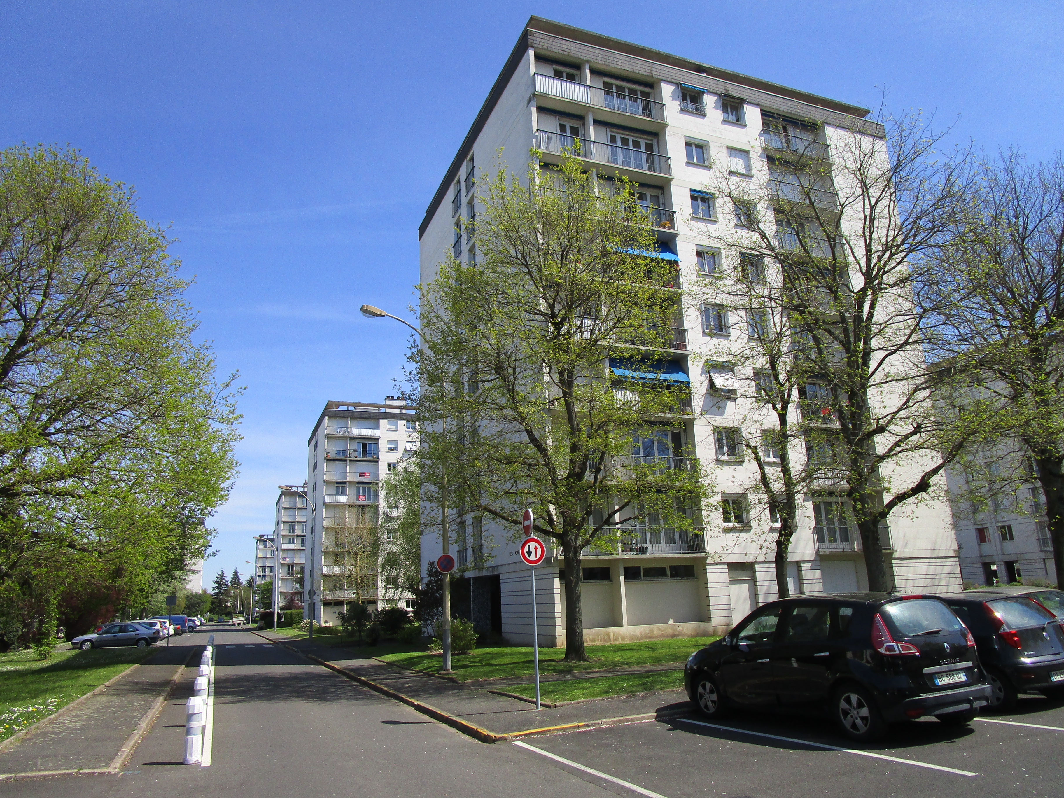 Tours du grand ensemble de Montjoyeux, allée André Le Notre, à Tours.